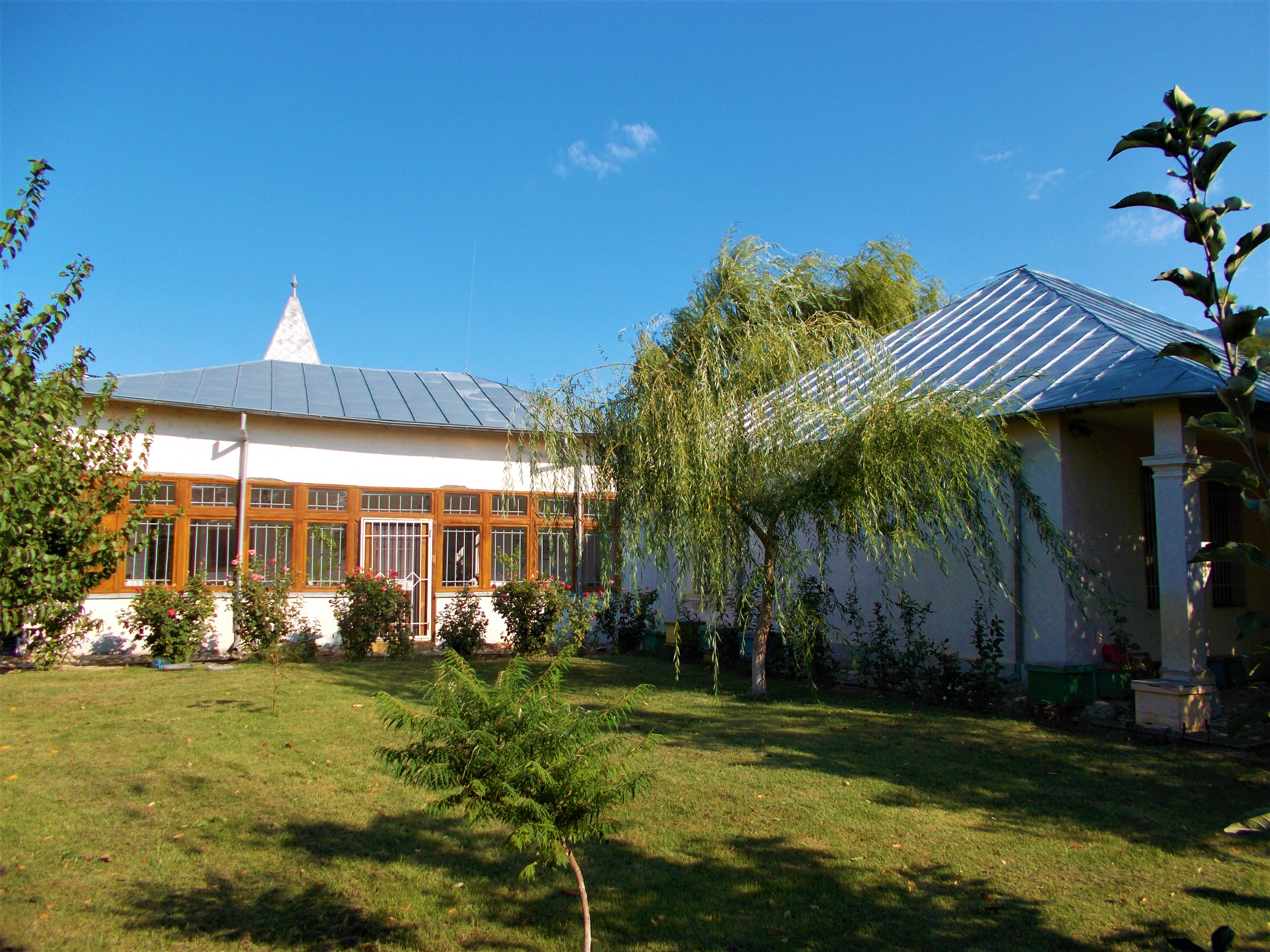 Casa memorială Ionel Perlea, satul Ograda, județul Ialomița